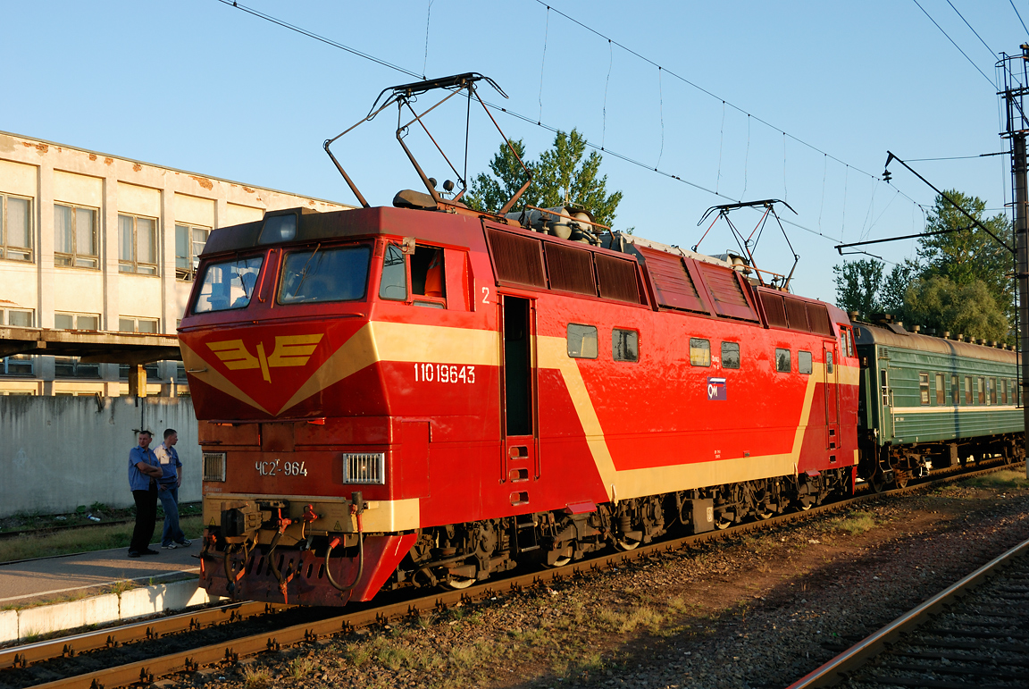 Электровоз ЧС2Т-964 серии 63E. # 6 Электровоз ЧС2Т.